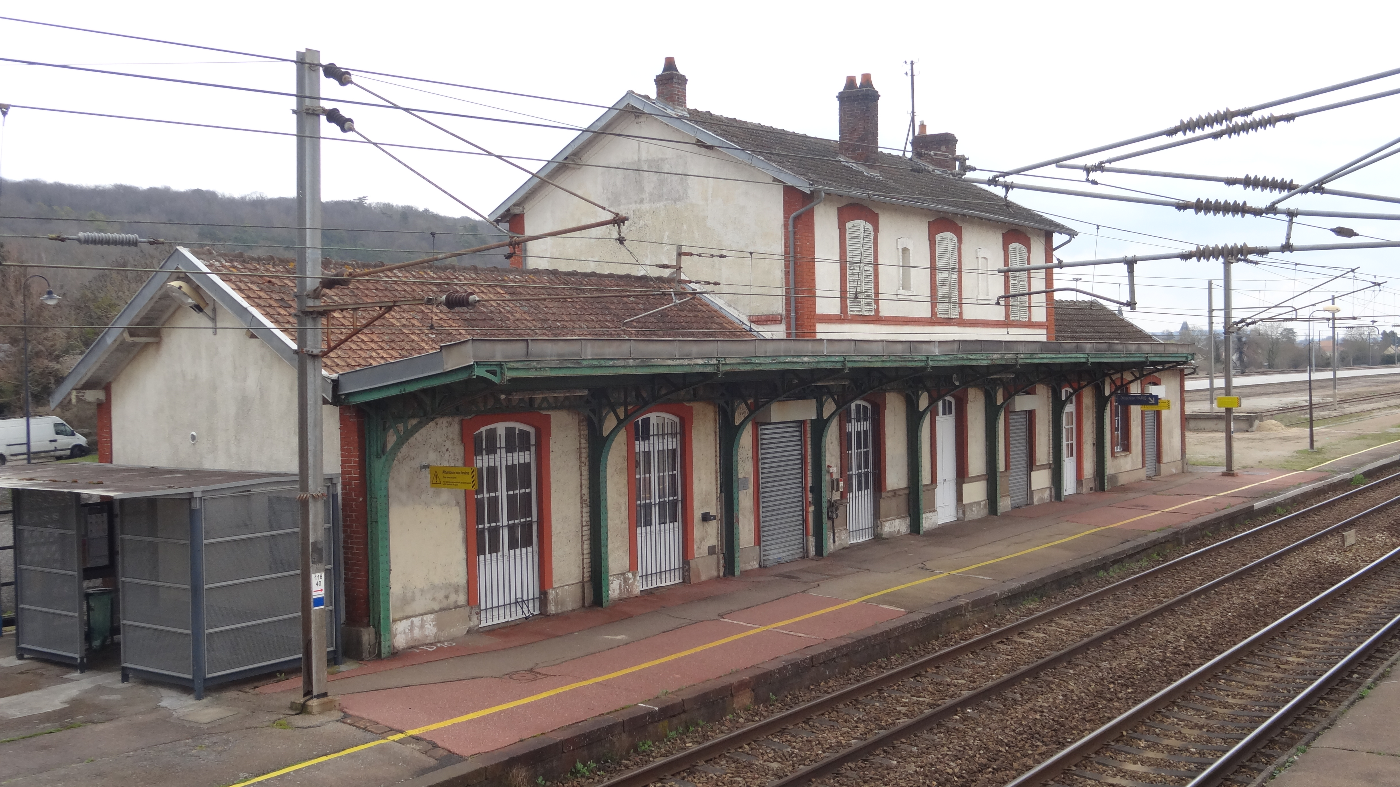 Bâtiment voyageurs de la gare de Pont-de-l'Arche (vue côté voies), département de l'Eure, France.